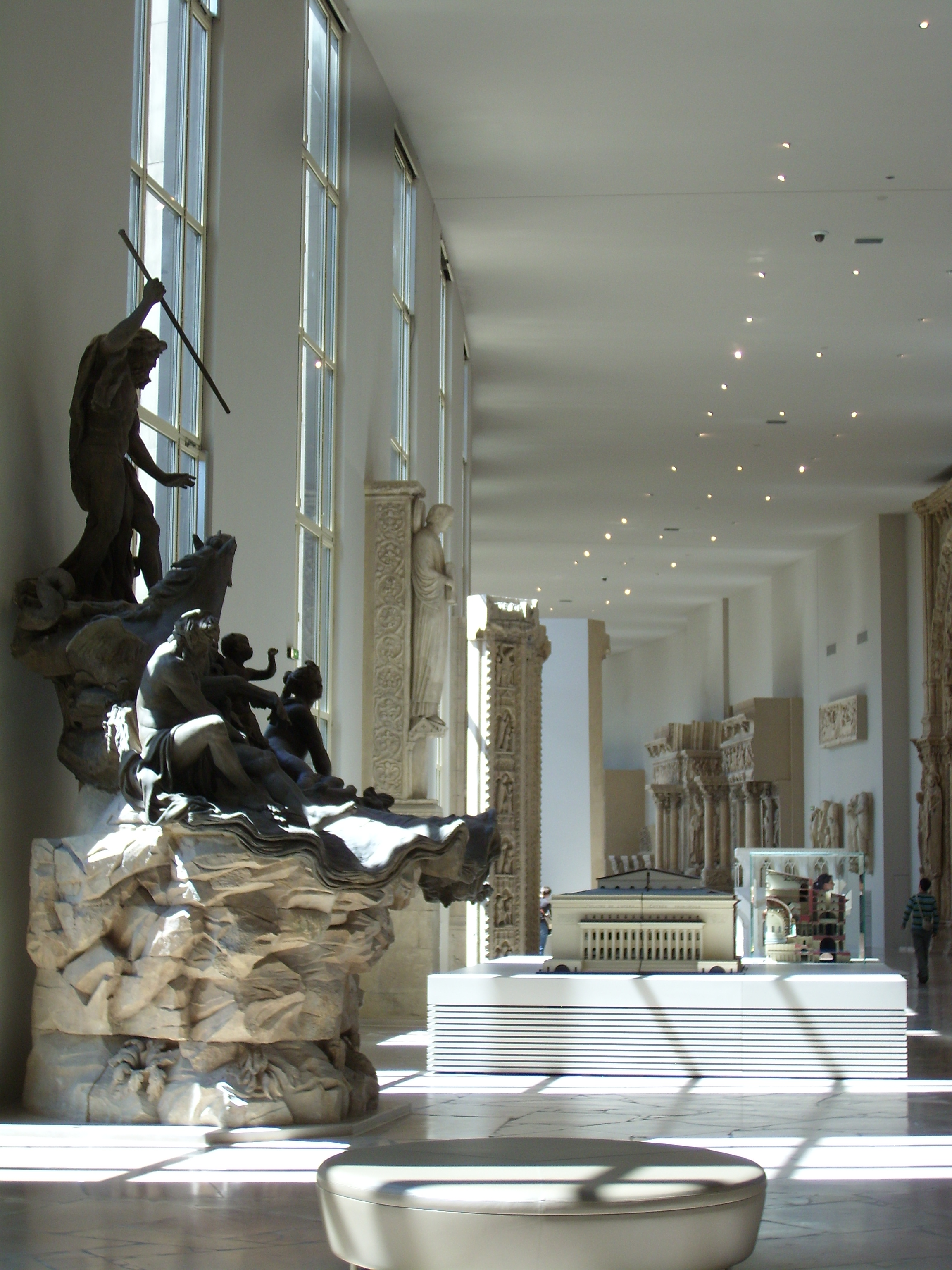 Galerie des Moulages, Musée des Monuments français, Paris